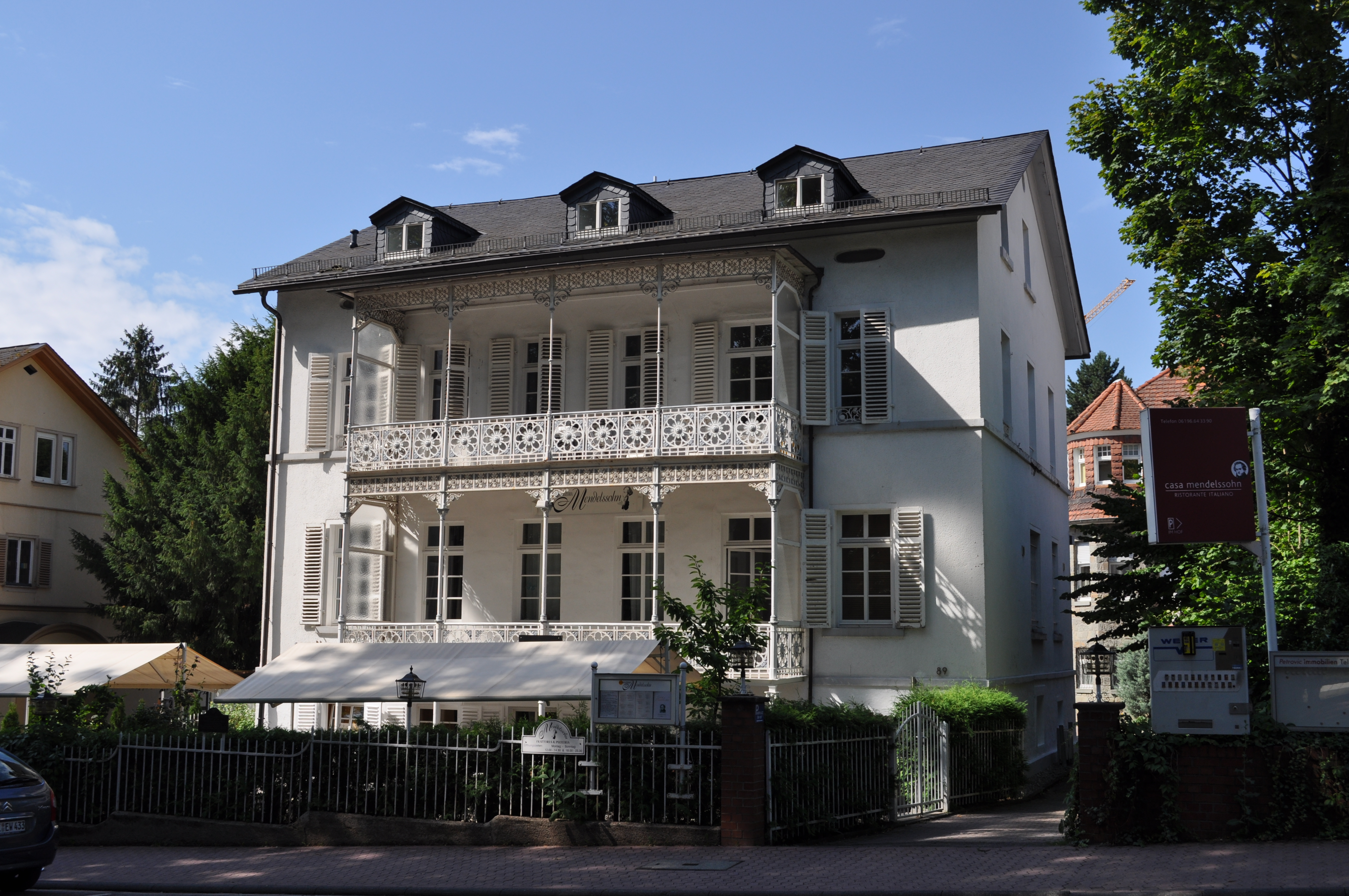 Ehemalige Kurpension Nassovia in Bad Soden. In diesem etwa 1840 erbauten Haus übernachteten unter anderen Giacomo Meyerbeer (1843), Felix Mendelssohn Bartholdy (1844/45) und Heinrich Hoffmann (1888 und später)